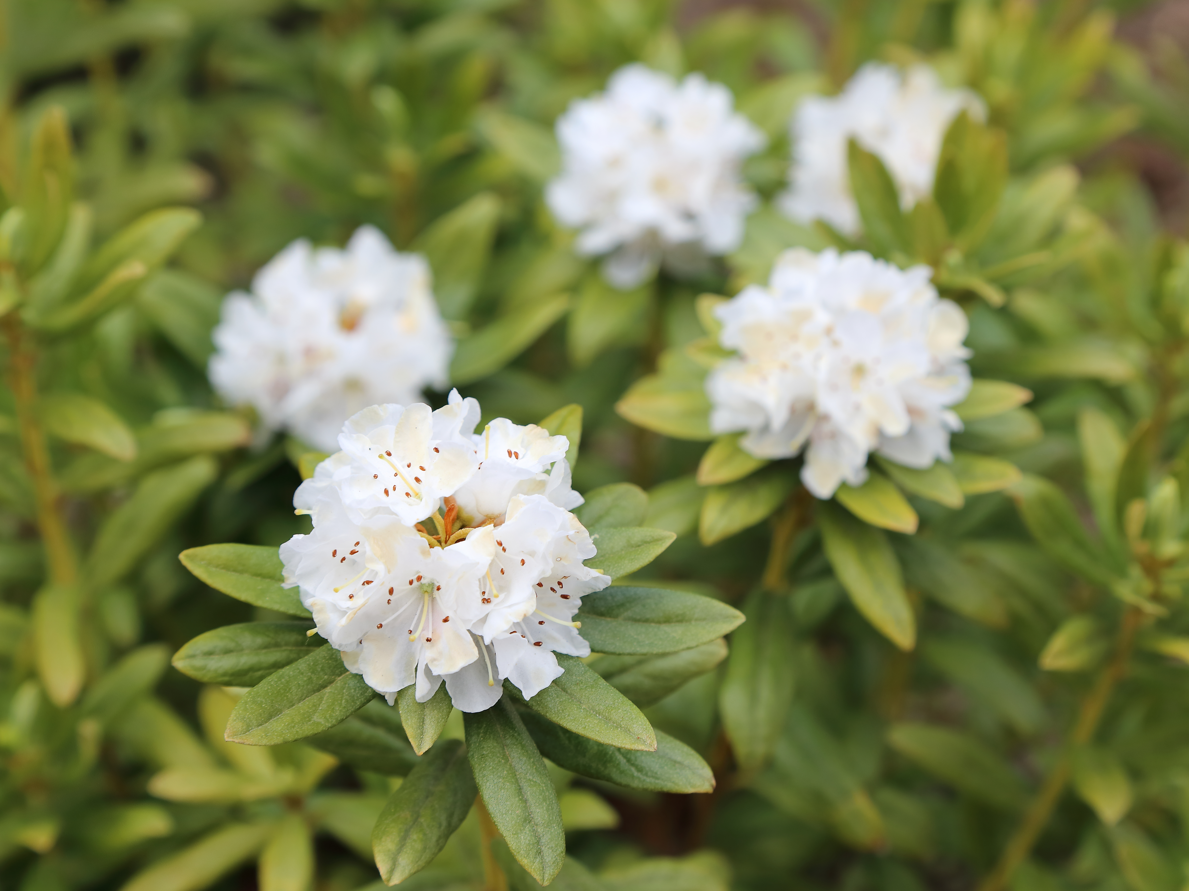 Rhododendron hippophaeoides identifierad med hjälp av skylt i Göteborgs botaniska trädgård.